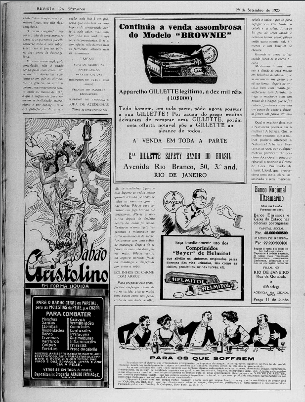 publicidade